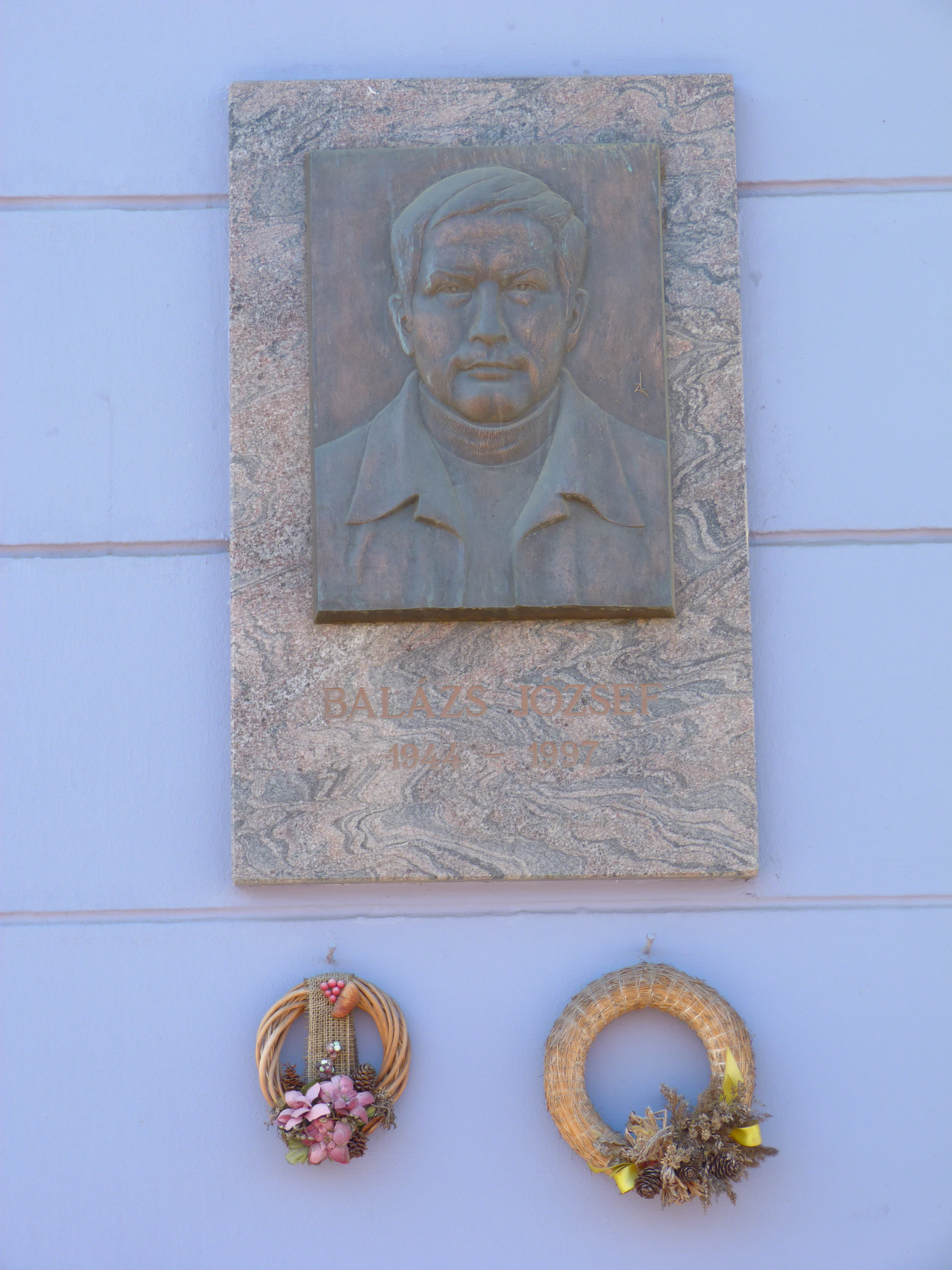 A felvételek 2013. Február 5 –én készültek Vásárosnaményben. Tamási Áron emléklap, Művelődési Ház, Balázs József emléklapja, Malenkíj robotra elhurcoltak emlékműve, Kraszna. Tomcsányi kastély. ©© Megjelent Creative Commons alatt a Metapolisz sorozatban. A Metapolisz sorozat valamennyi képe és filmje Creative Commons alatti valamint kereskedelmi - for profit - célra is felhasználható. Ajánlott hivatkozás: Derzsi Elekes Andor: Metapolisz DVD line ©© Published under Creative Commons in the Metapolisz DVD line. All of the photos and vids in the Metapolisz DVD line are under Creative Commons and can be used even for commercial – for profit – purposes. Recommended Citation Derzsi Elekes Andor: Metapolisz DVD line